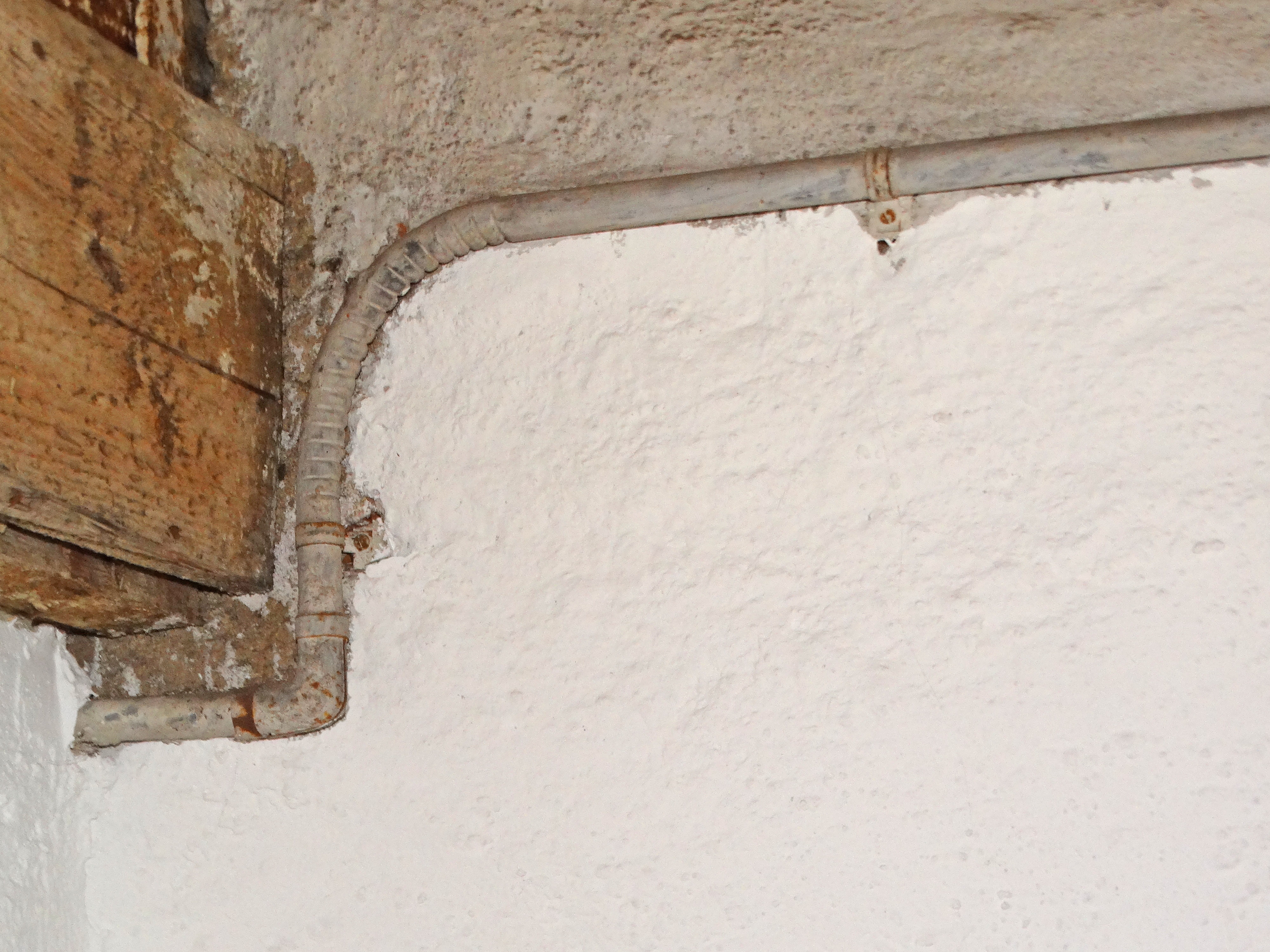 Verlegtes Kuhlo-Rohr mit Eckstück, Bogen und Befestigungsschelle in einem Dresdner Dachboden aus dem Jahr 1929